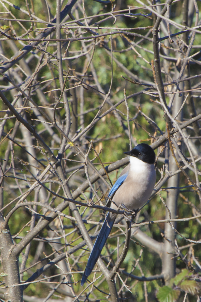 Manzanares el Real, Comunidad de Madrid, España.